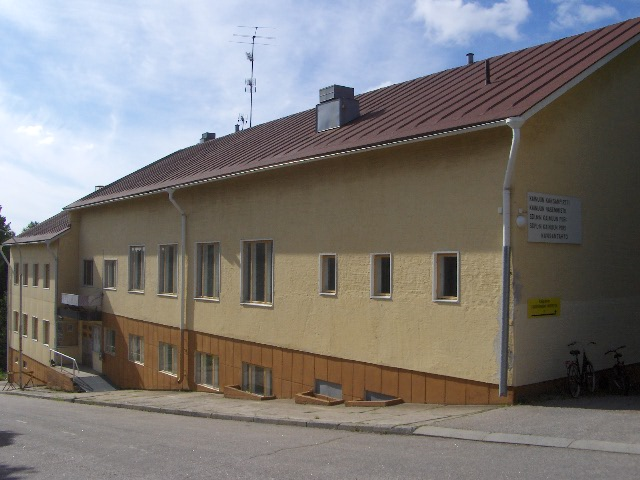 Kansan Pirtti, Kajaanin työvästön talkoilla rakentama kokoontumispaikka